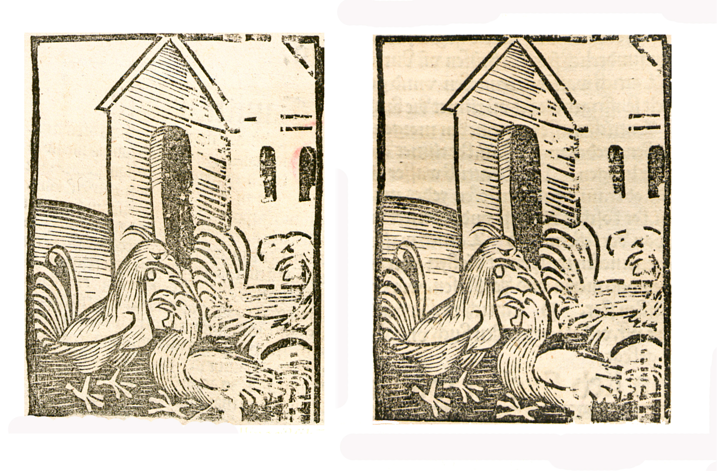 Abbildung von: Kappen (Kapaun)